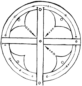 Signo rodado de Fernán Peres de Trava, conde de Galiza (séc. XII)